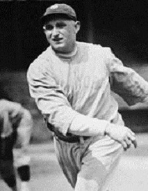 カール・メイズ、1922年